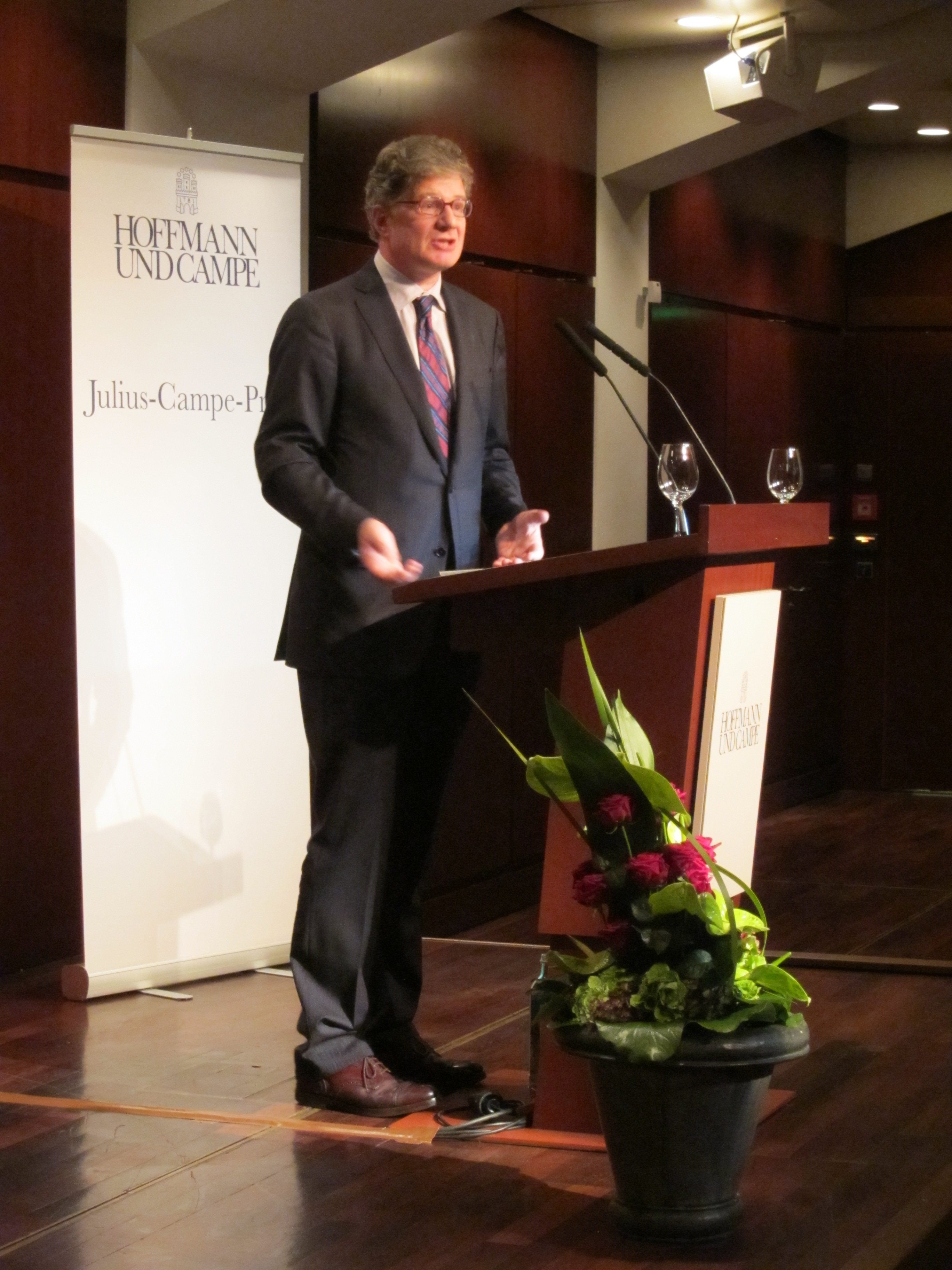 Frankfurter Buchmesse 2011 Frankfurter Buchmesse 2011, Verleihung des Julius-Campe-Preises (Roger Willemsen)